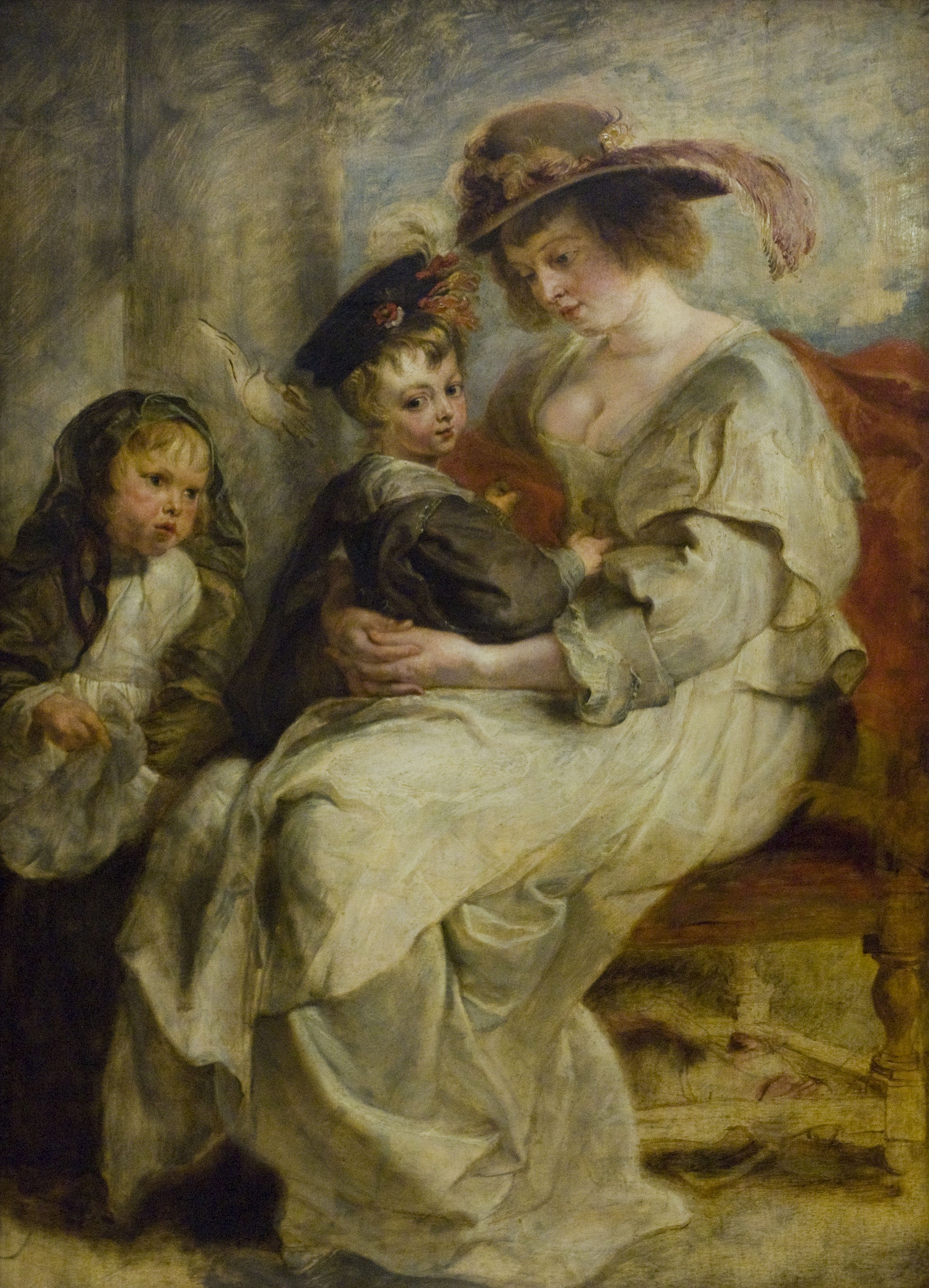 Hélène Fourment et deux de ses enfants